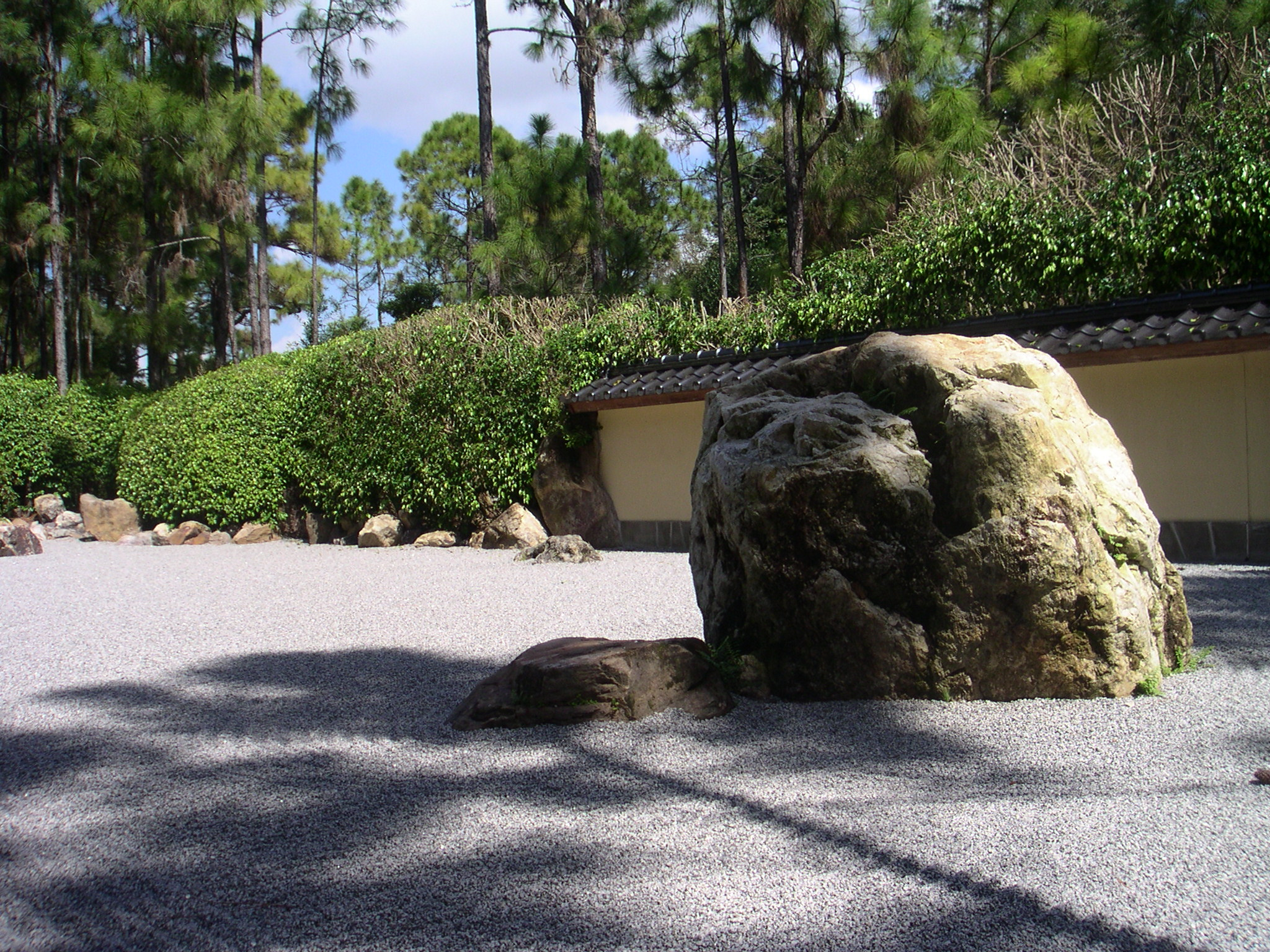 Late rock garden at Roji-en, Morikami Museum, Delray Beach, FL -- Feb. 2004